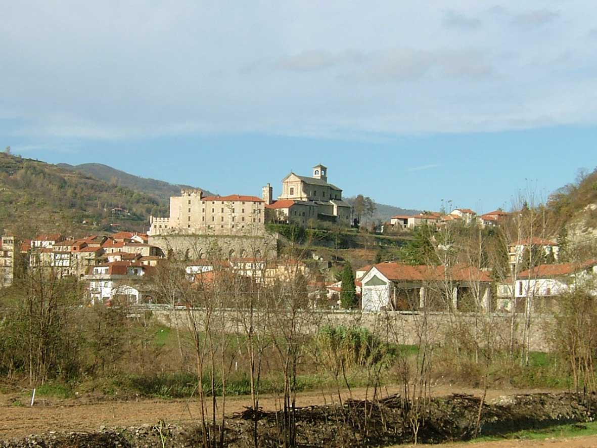 Monesiglio CN